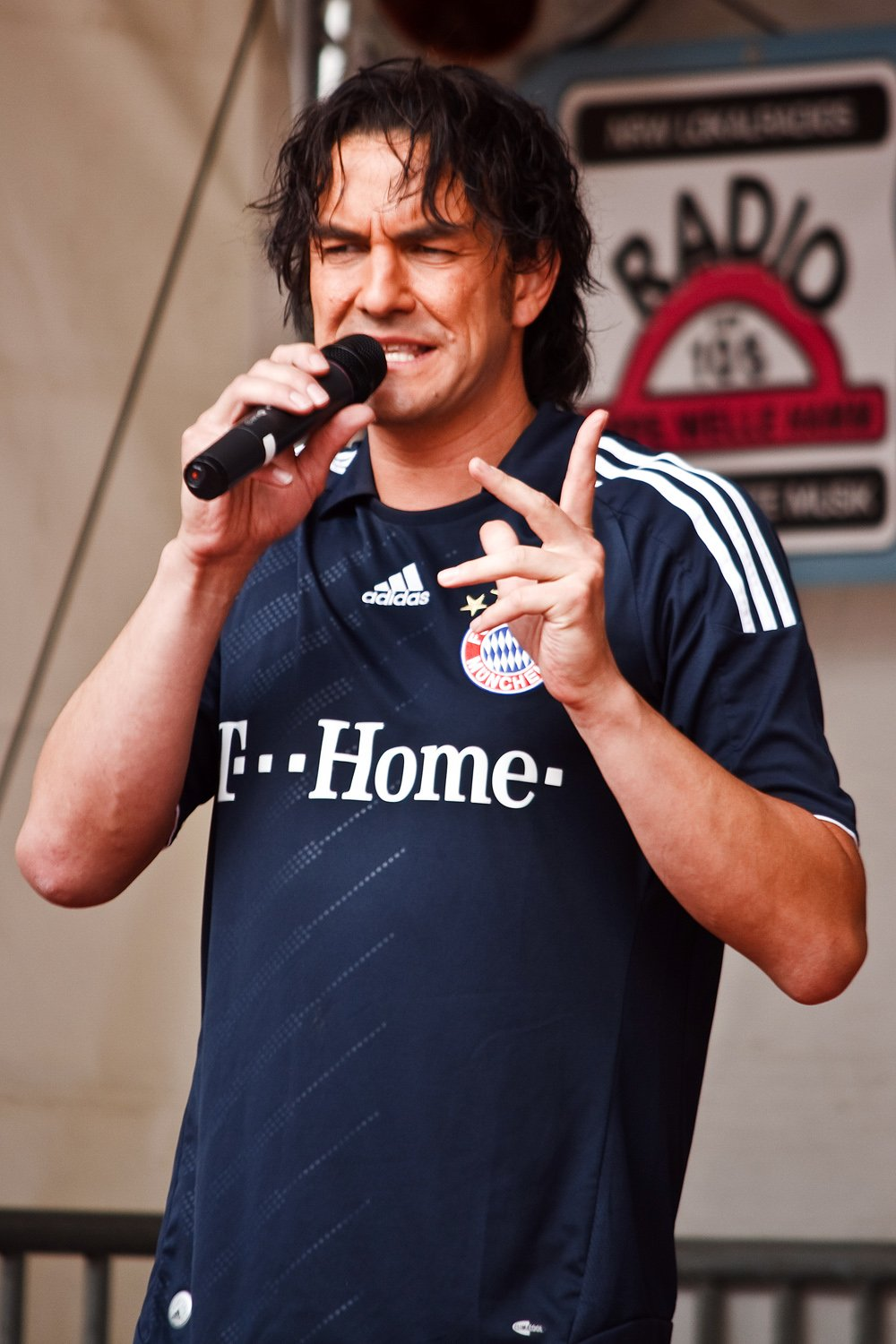 Matze Knop als Luca Toni beim NRW-Tag in Hamm, 27. Juni 2009